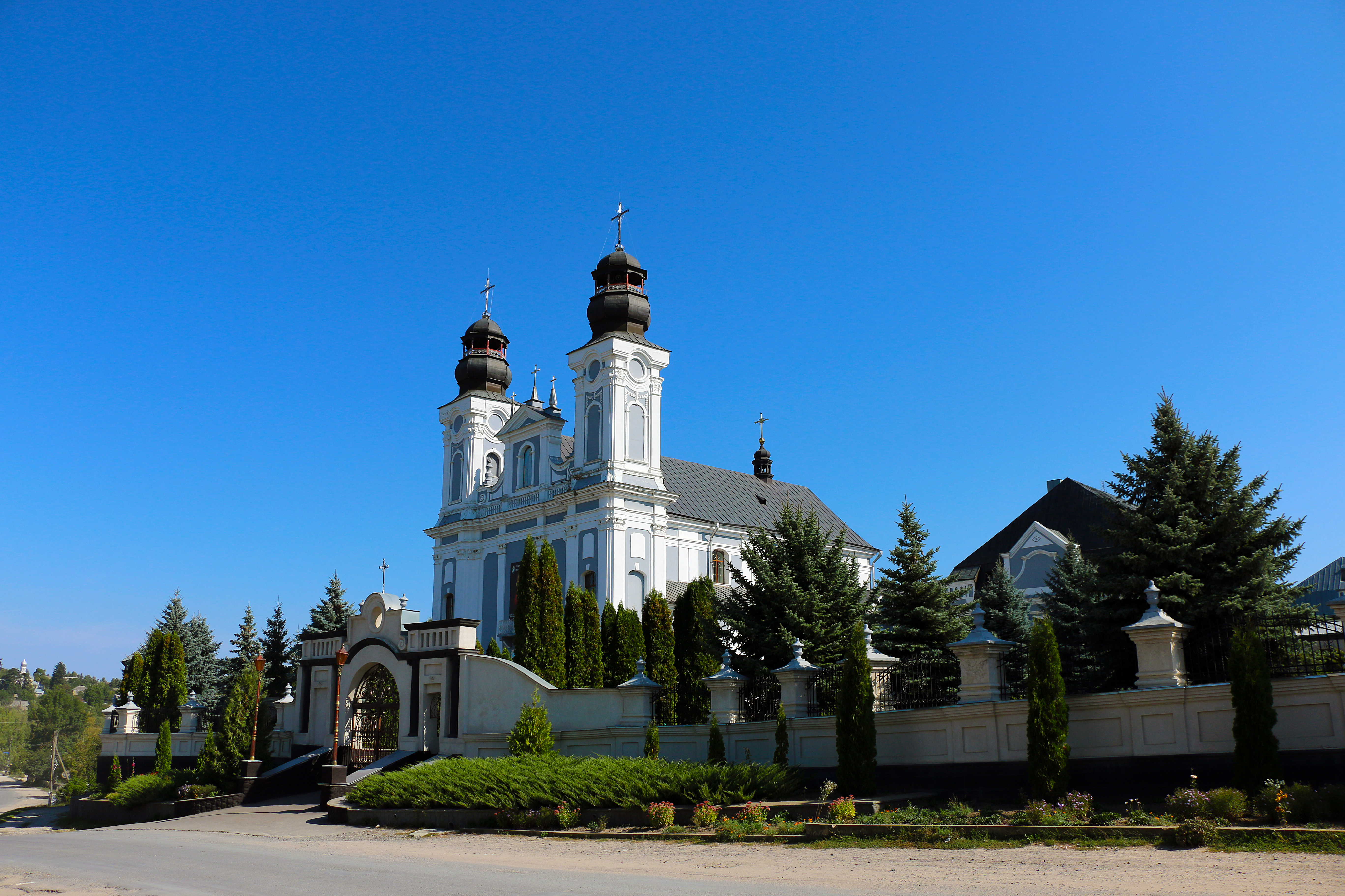 Домініканський монастир (мур.), Мурафа, вул. Дружби,72